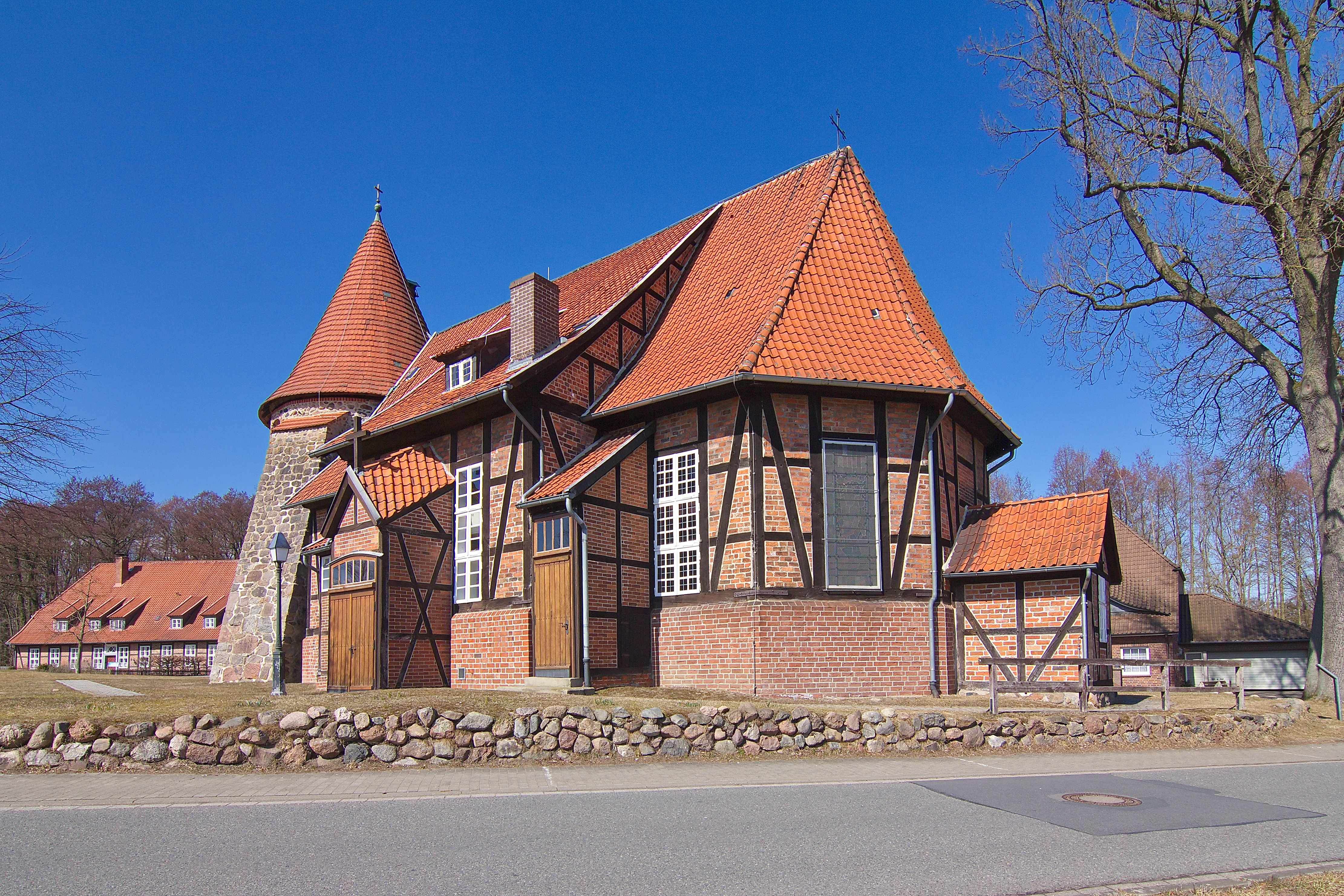 St.-Remigius-Kirche in Suderburg, Niedersachsen, Deutschland. Der Turm datiert aus der Umnutzung einer um 1000 n.Chr. errichteten Burg.